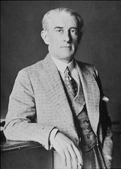 Foto Maurice Ravel